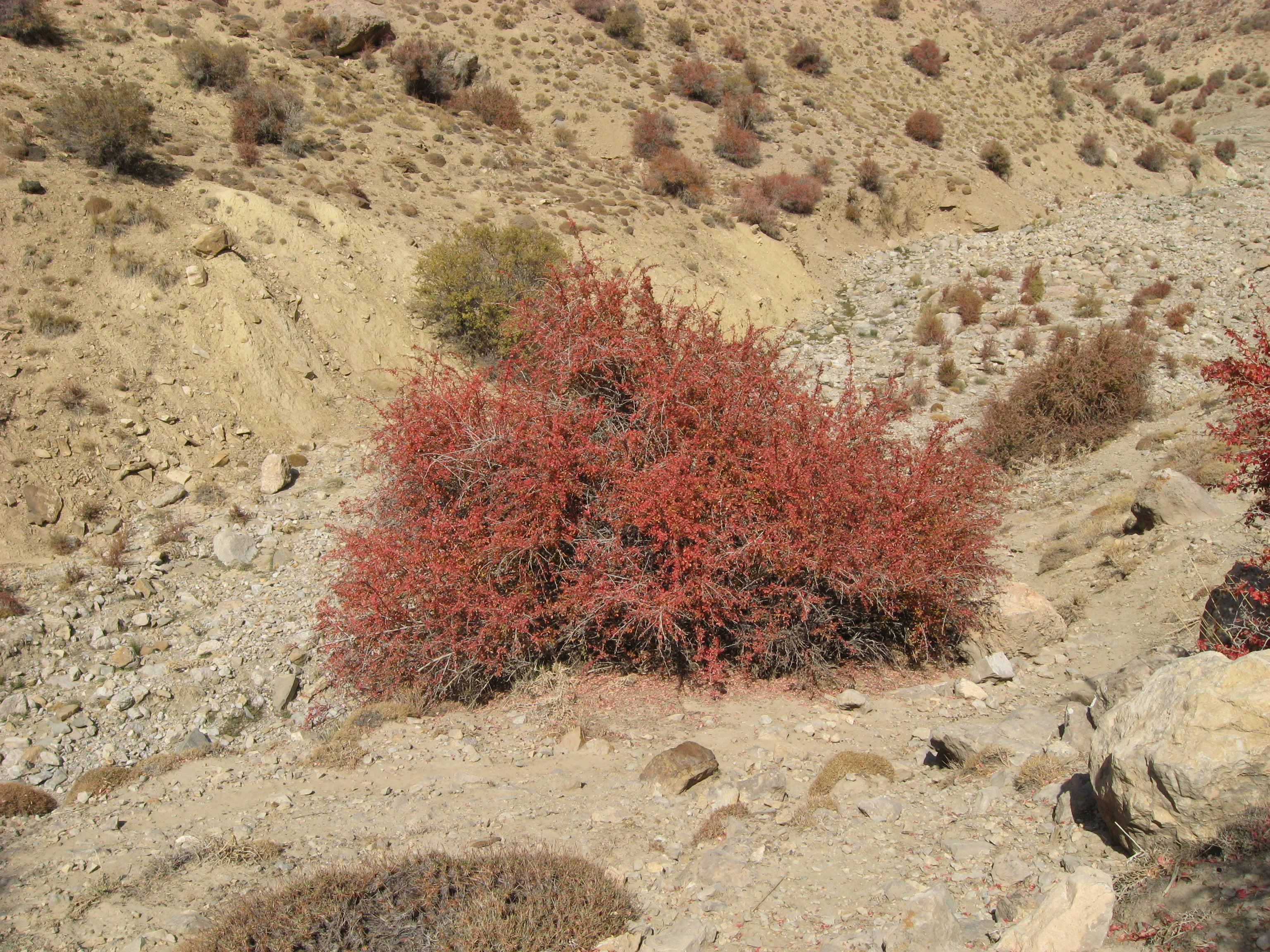 این عکس مربوط به درخچه زرشک از پوشش کوهستای روستای زالی است که در سال 1388 توسط احمد نیک گفتار تهیه گردیده است